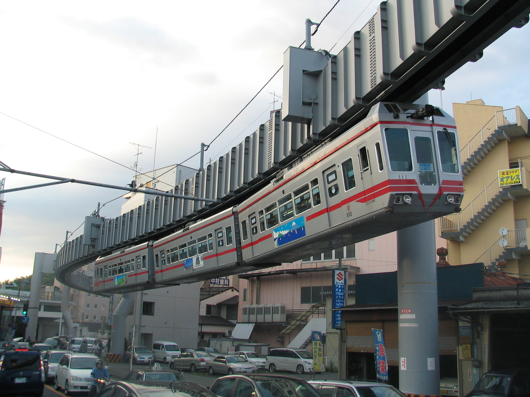 湘南モノレール500形 大船～富士見町にて Shonan monorail type 500 electric multiple unit